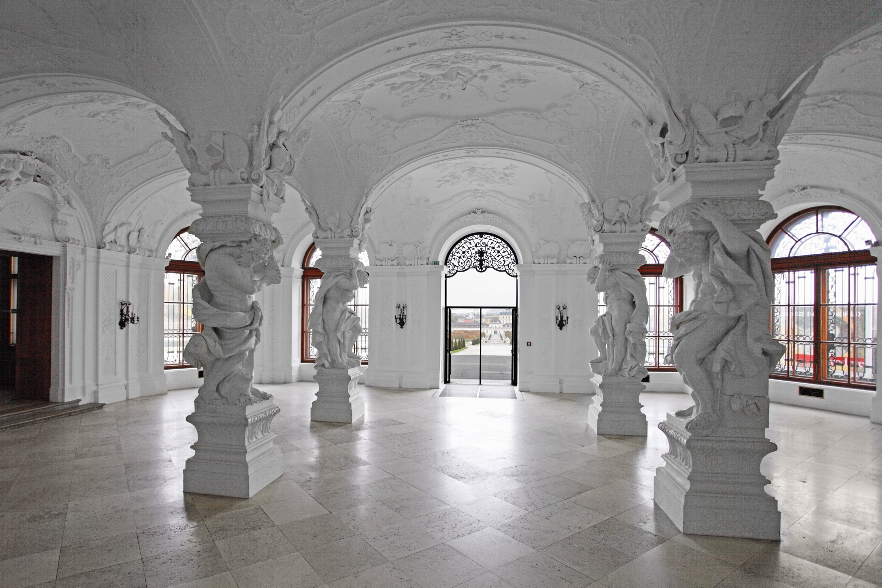 Johann Lucas von Hildebrandt, Sala Terrana im Oberen Schloss Belvedere